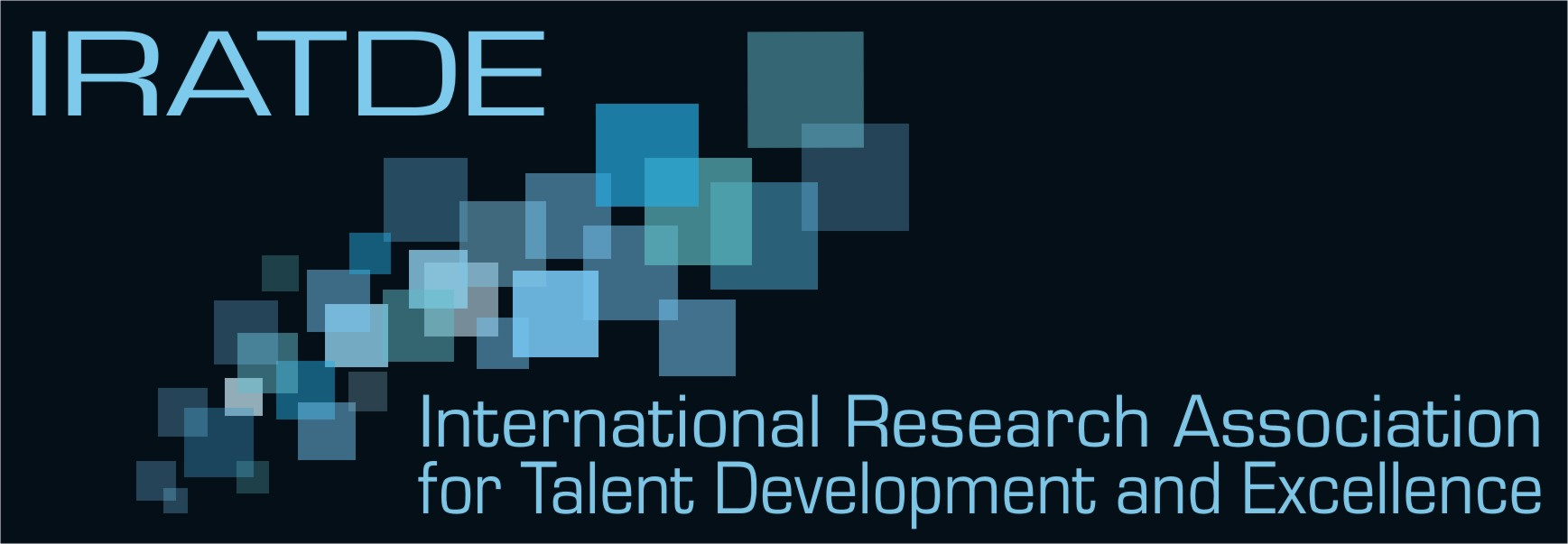 هذا اللوغو خاص بالجمعية العالمية لتنمية أبحاث الموهبة والتميز